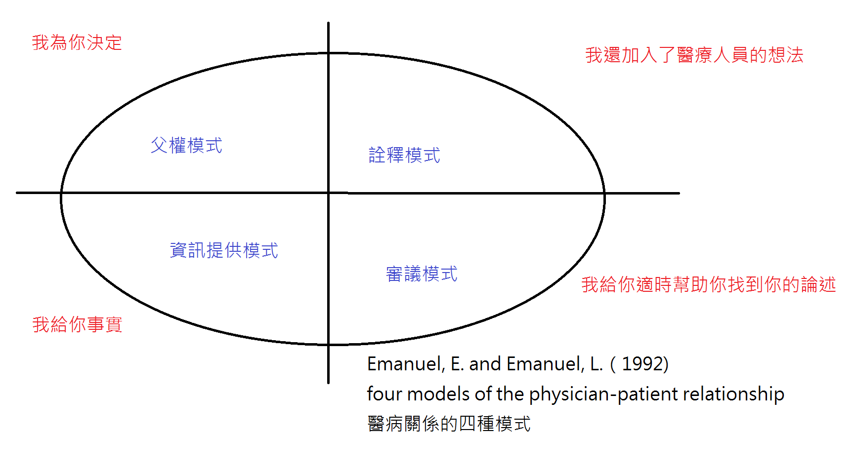 Emanuel, E. and Emanuel, L.（1992）在醫病關係的四種模式